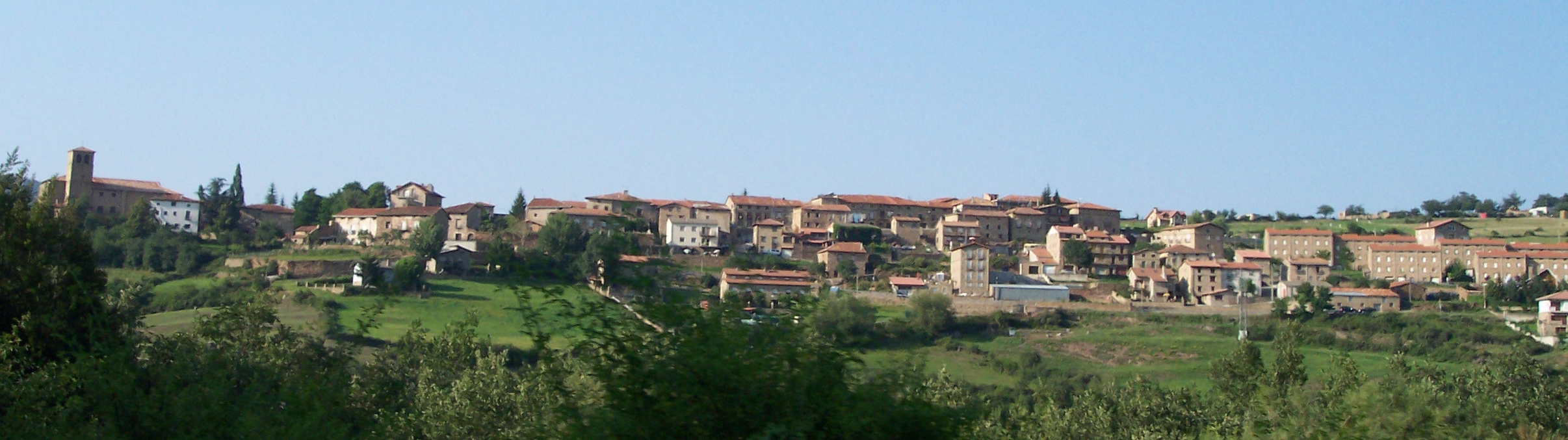 Panorámica del pueblo